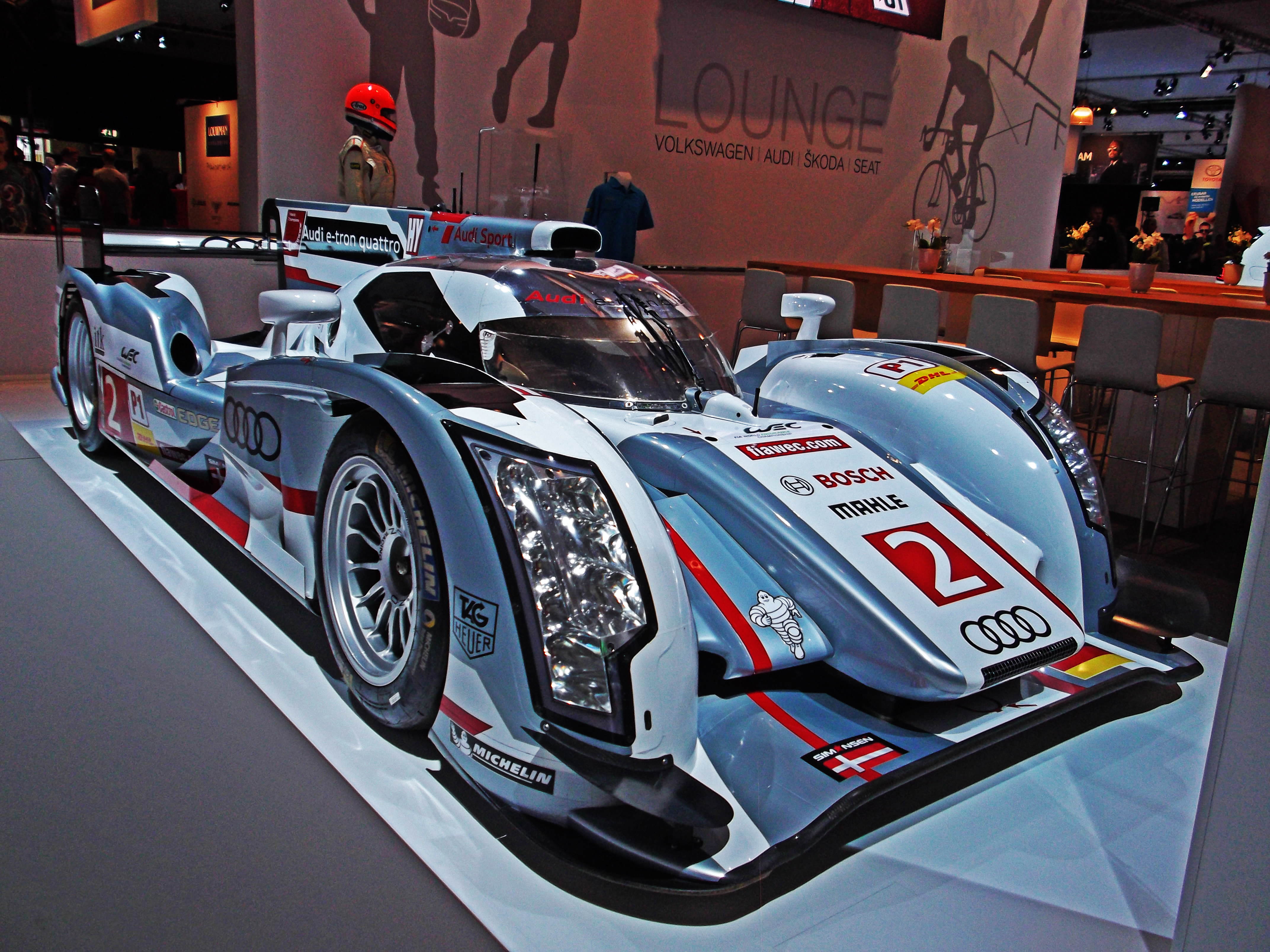 AutoRAI 2015.